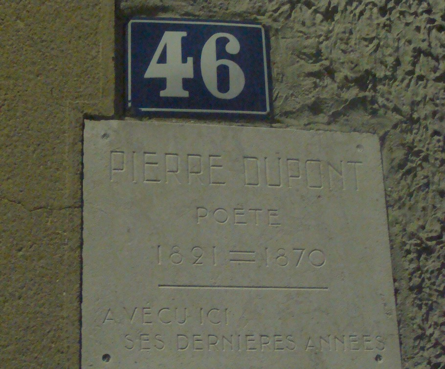 Plaque apposée sur la maison où mourut Pierre Dupont, à la Croix-Rousse (Lyon, 1er)